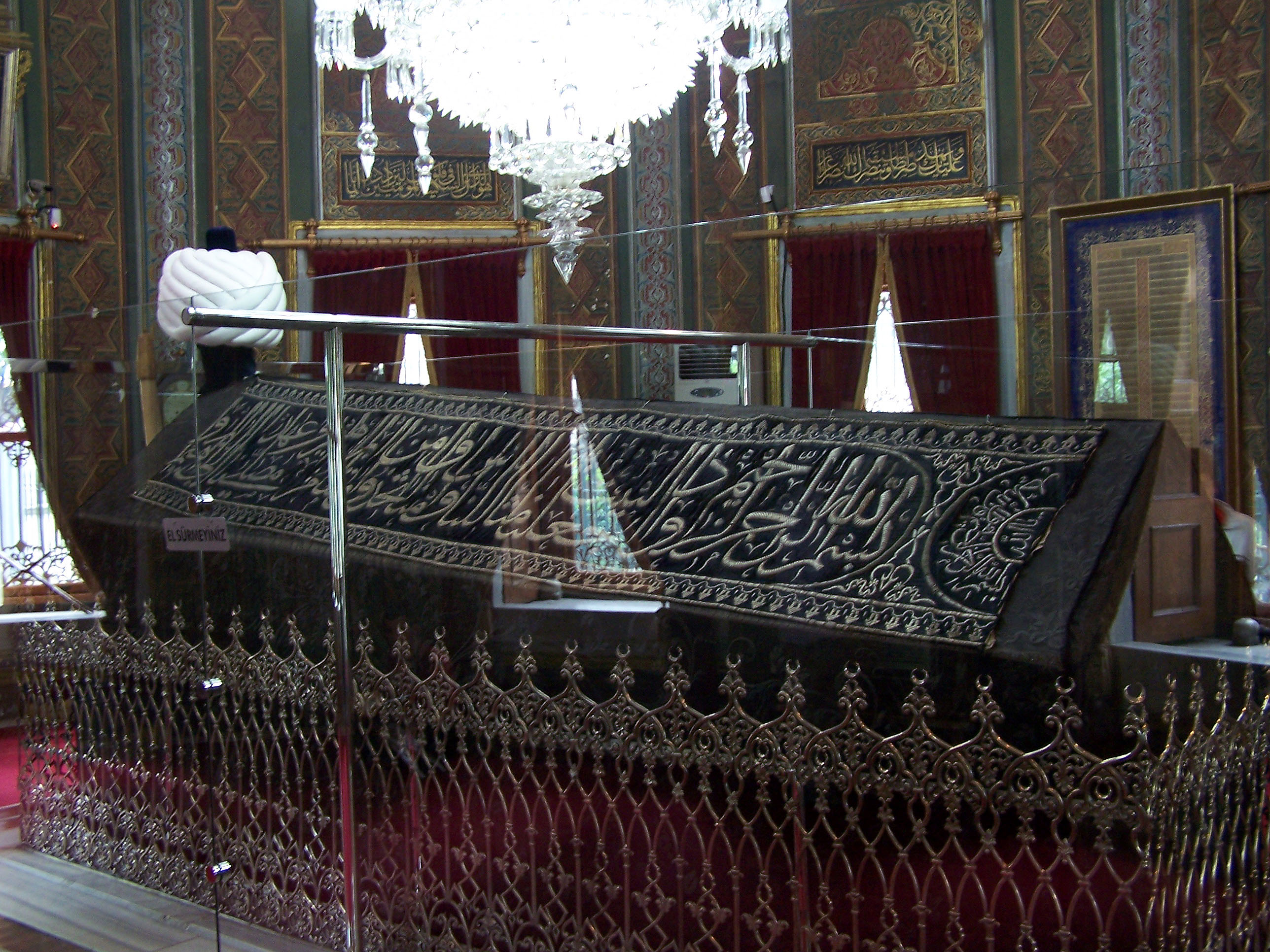 Fatih Sultan Mehmet Türbesi at Fatih Camii in Fatih, İstanbul, Turkey